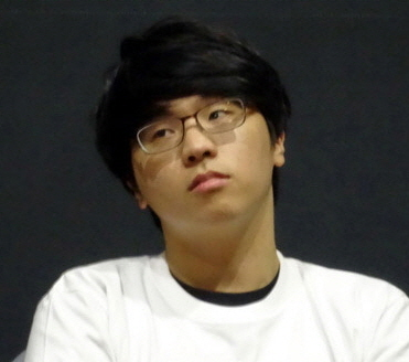 2015 롤챔스 코리아 스프링 우승팀 SKT T1 인터뷰